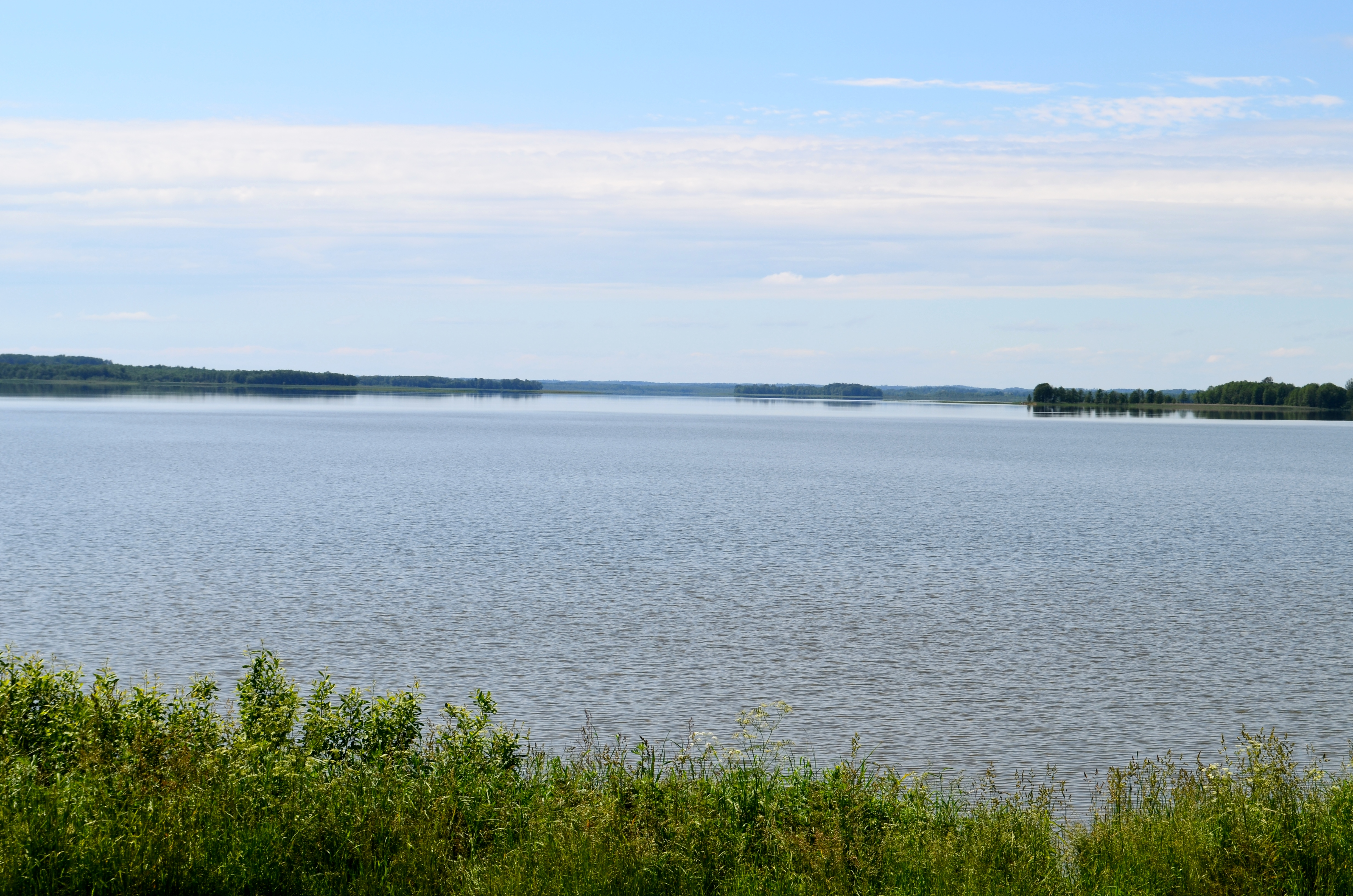 Dysnų ežeras nuo Čižiūnų, Ignalinos r.